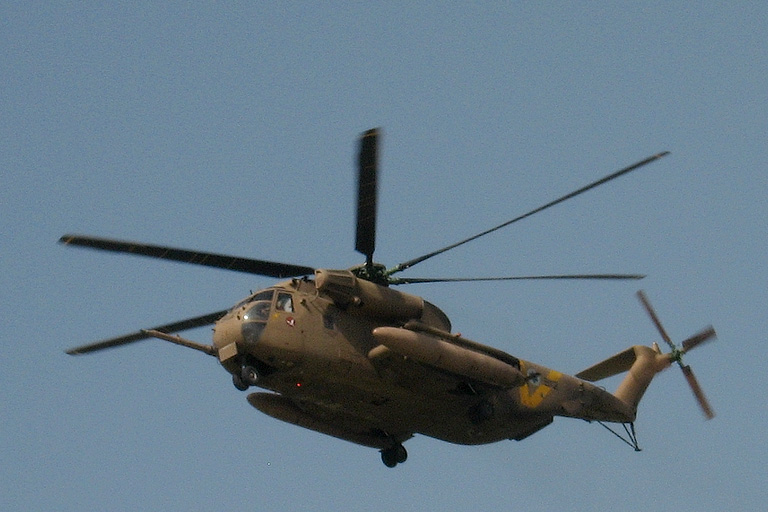 IAF CH-53 Sea Stallion